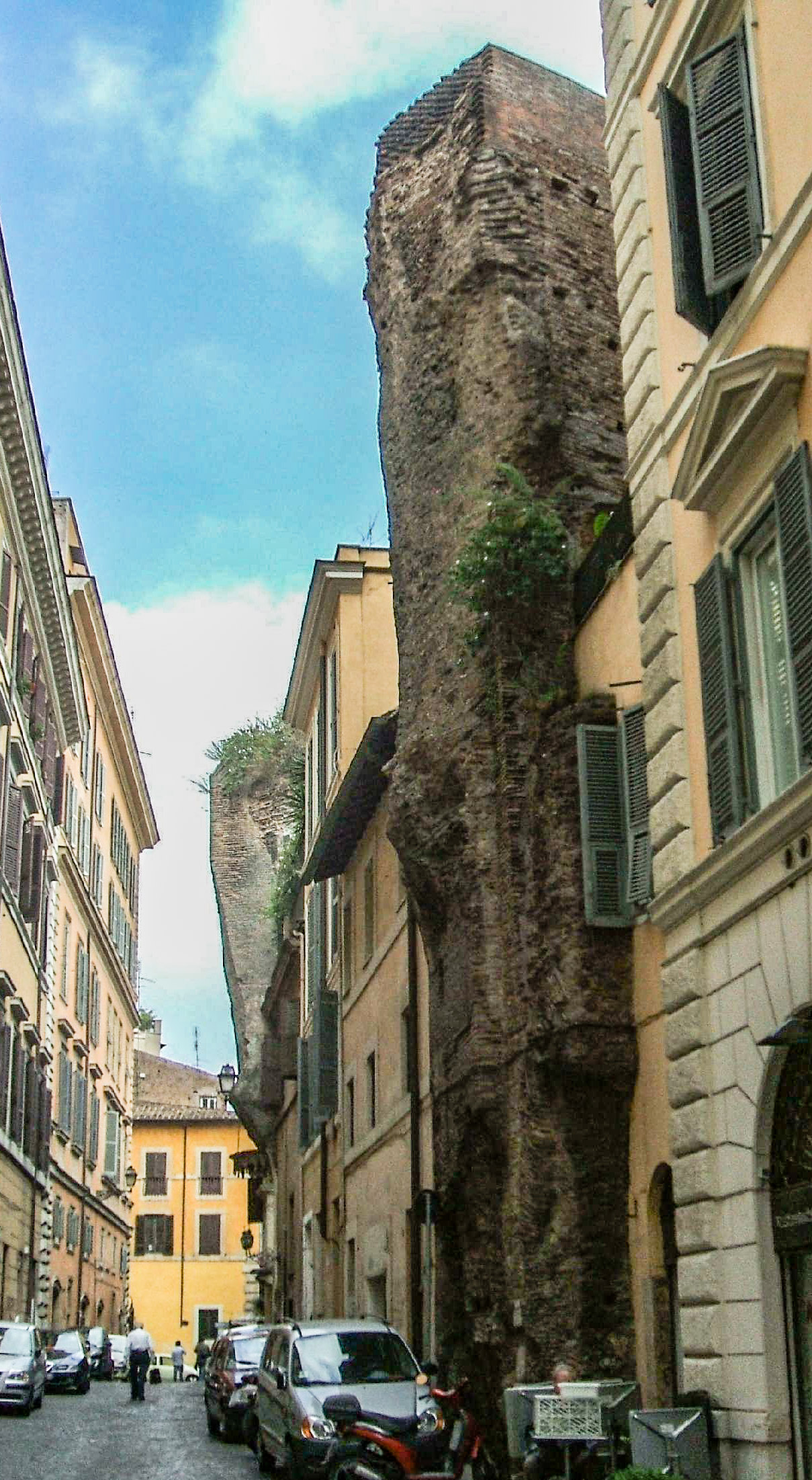 Remains of Baths of Agrippa along Via dell' Arco della Ciambella, Rome